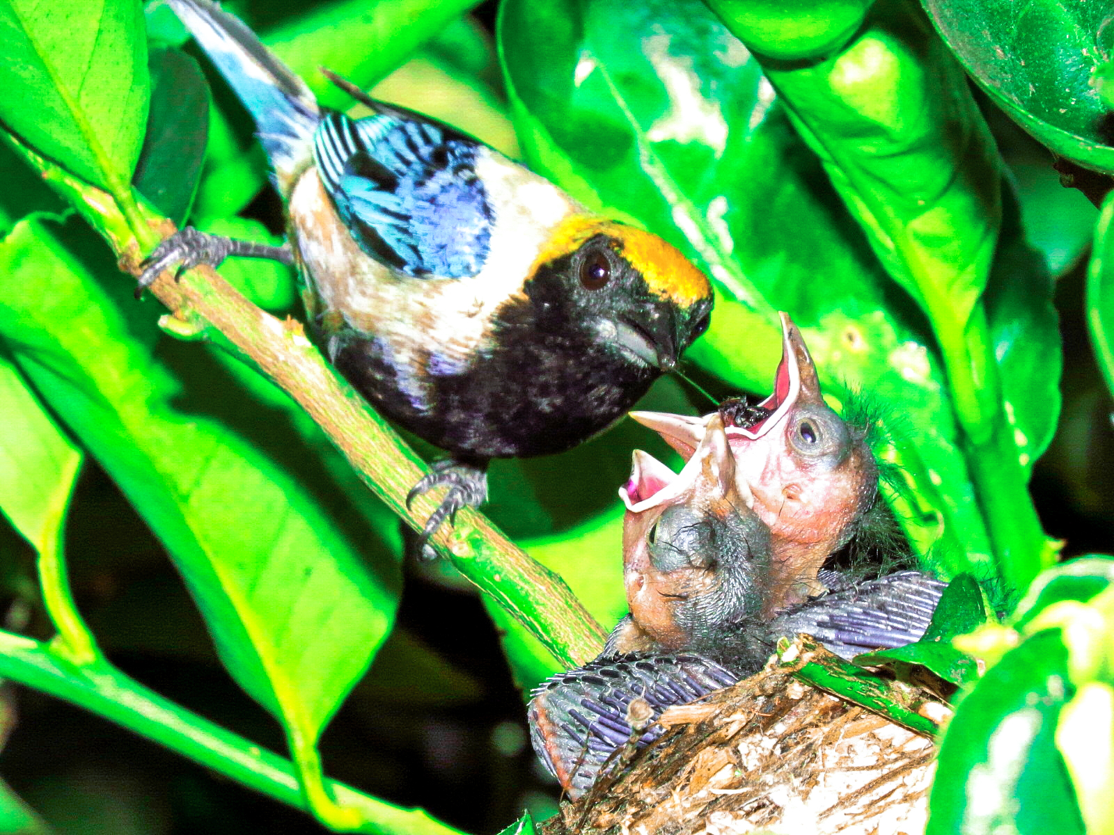 Saíra amarela (Tangara cayana), macho, alimentando filhotes. Bioma Cerrado.